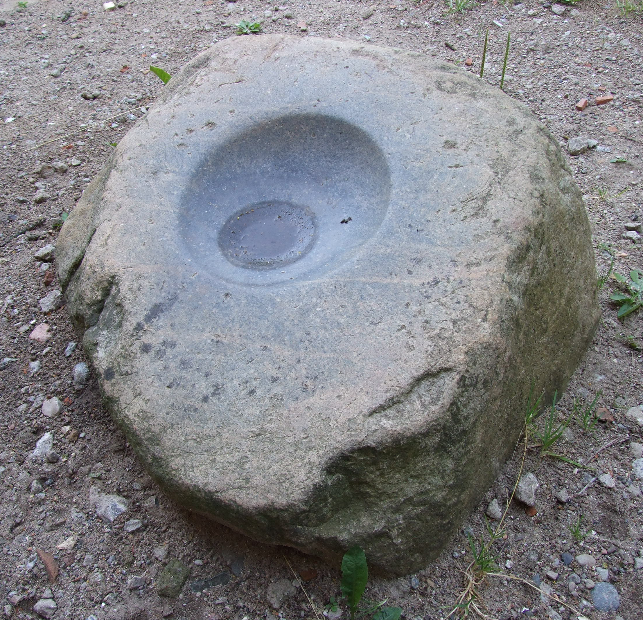 Opferstein vor der Kapelle Althof (Schalenstein?) 12. Jahrhundert